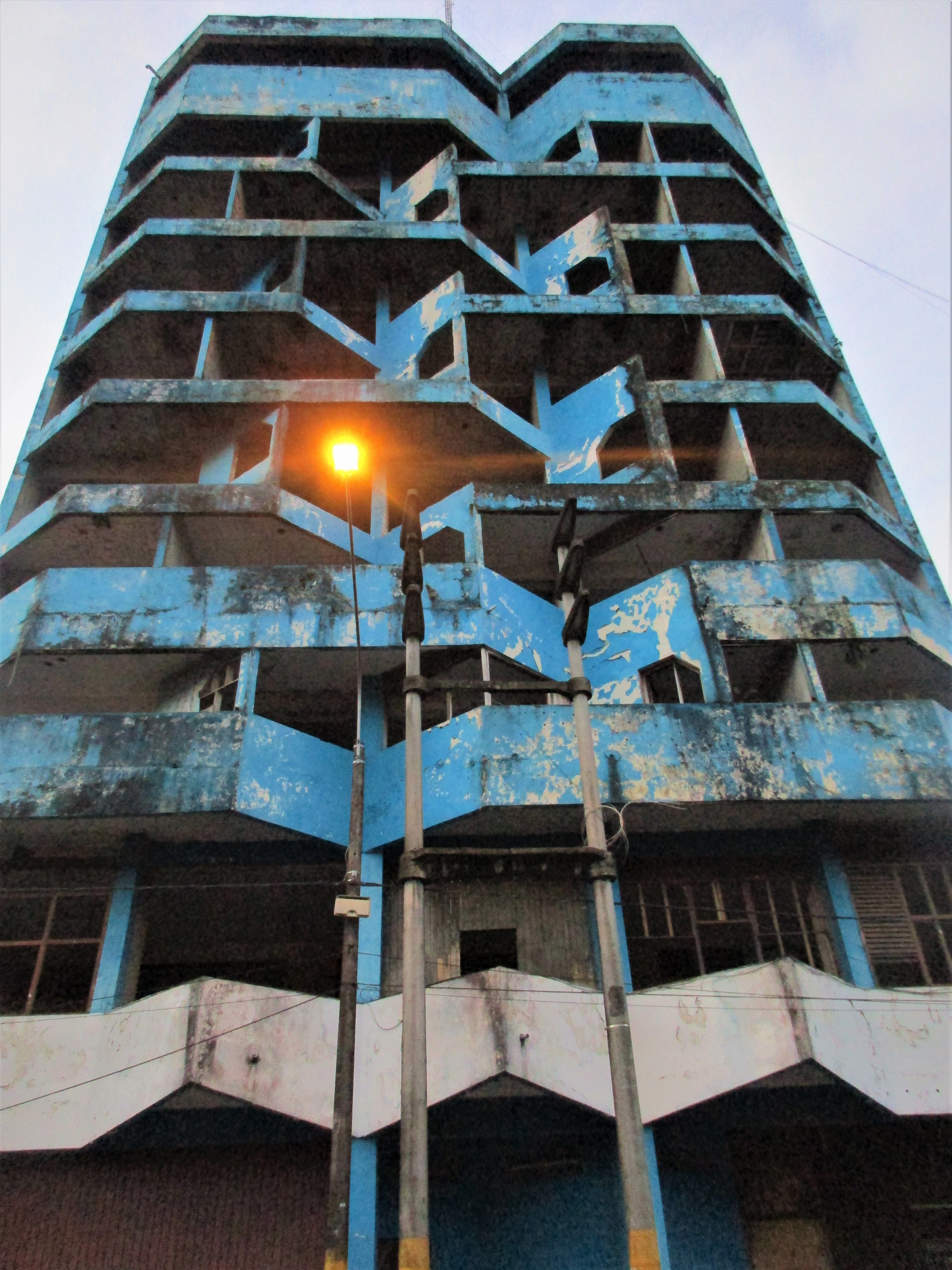 Uno de los edificios antiguos al lado del jirón Próspero que forman parte del conjunto de Antiguos Edificios del Seguro Social de Salud del Perú en el centro de Iquitos, Perú